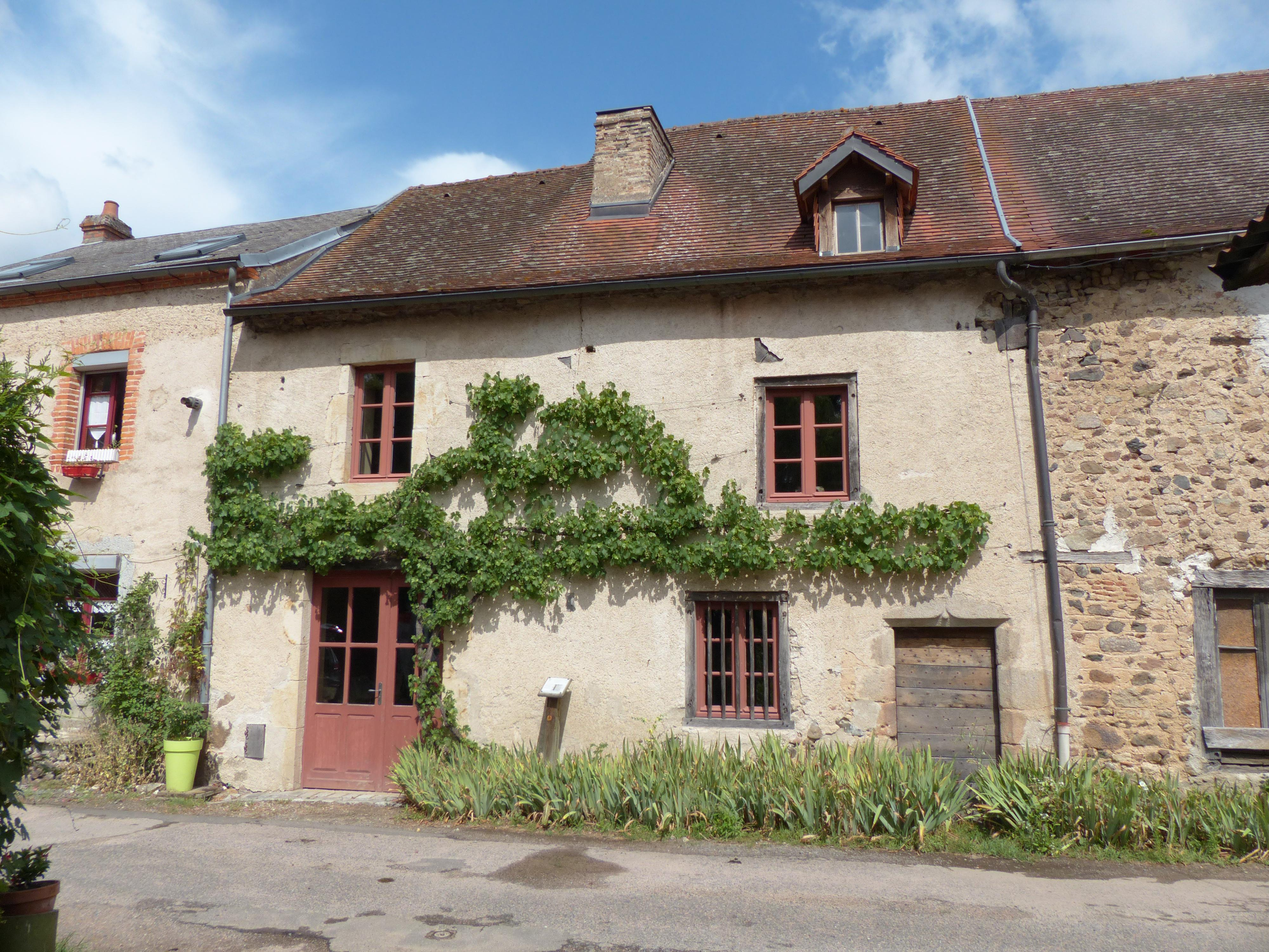 Arronnes (Puy-de-Dôme). Maison Gamet, rue du Vareille. Cette maison du XVe et XVIe siècles a conservé des éléments anciens : porte d'entrée avec arc en accolade, fenêtre à barreaudage en bois ; à l'intérieur, on peut voir des plafonds à la française avec planchers de chêne, un dallage de tomettes au rez-de-chaussée et deux cheminées.